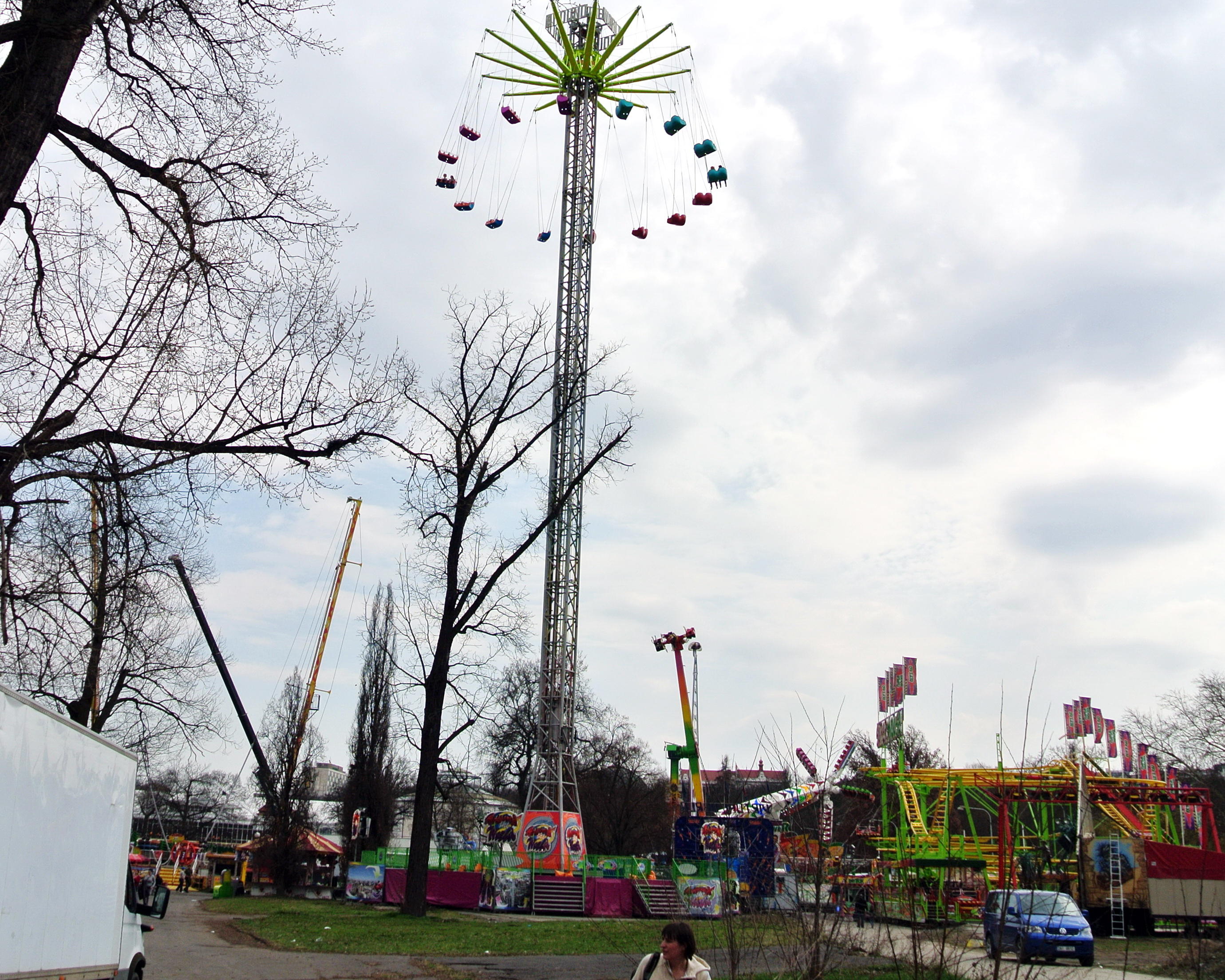 Atrakce na pouti